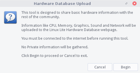 "Lite Info" das Programm von Linux Lite 3 zum Upload von Hardware-Informationen in die Hardware-Datenbank von Linux Lite.